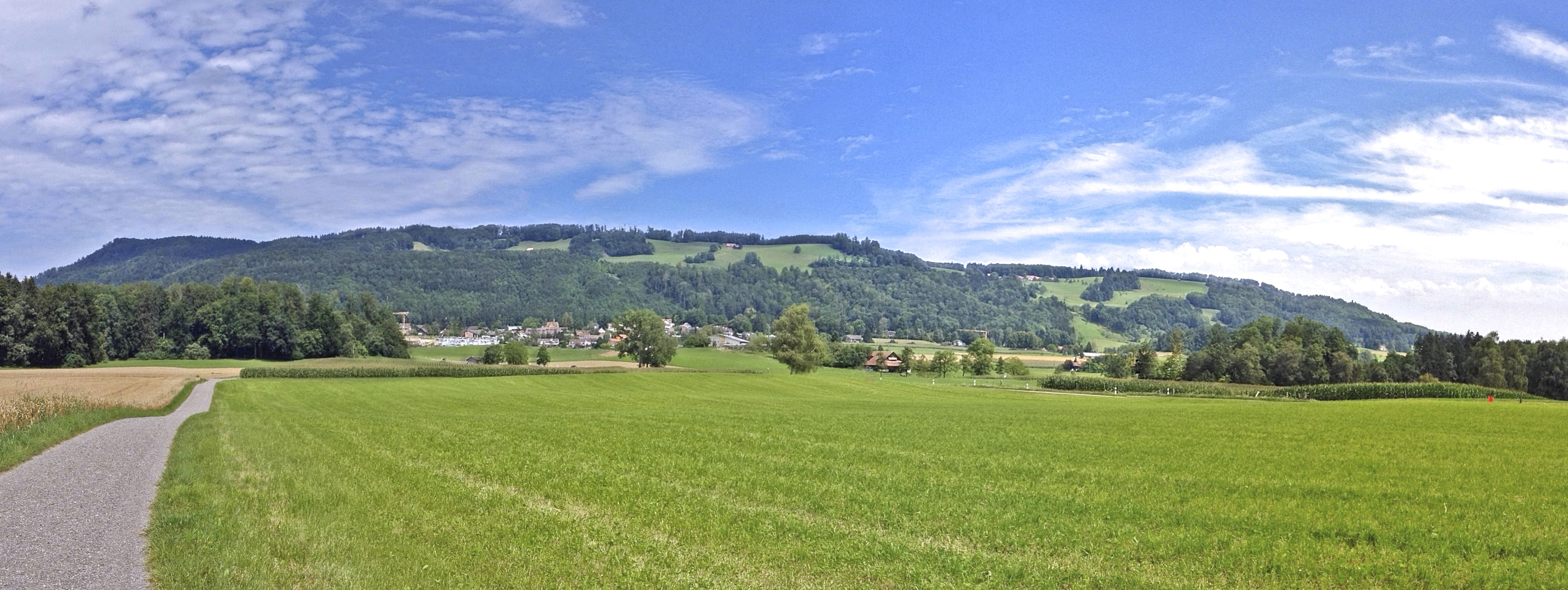 Blick von Näfenhüser zur Albiskette